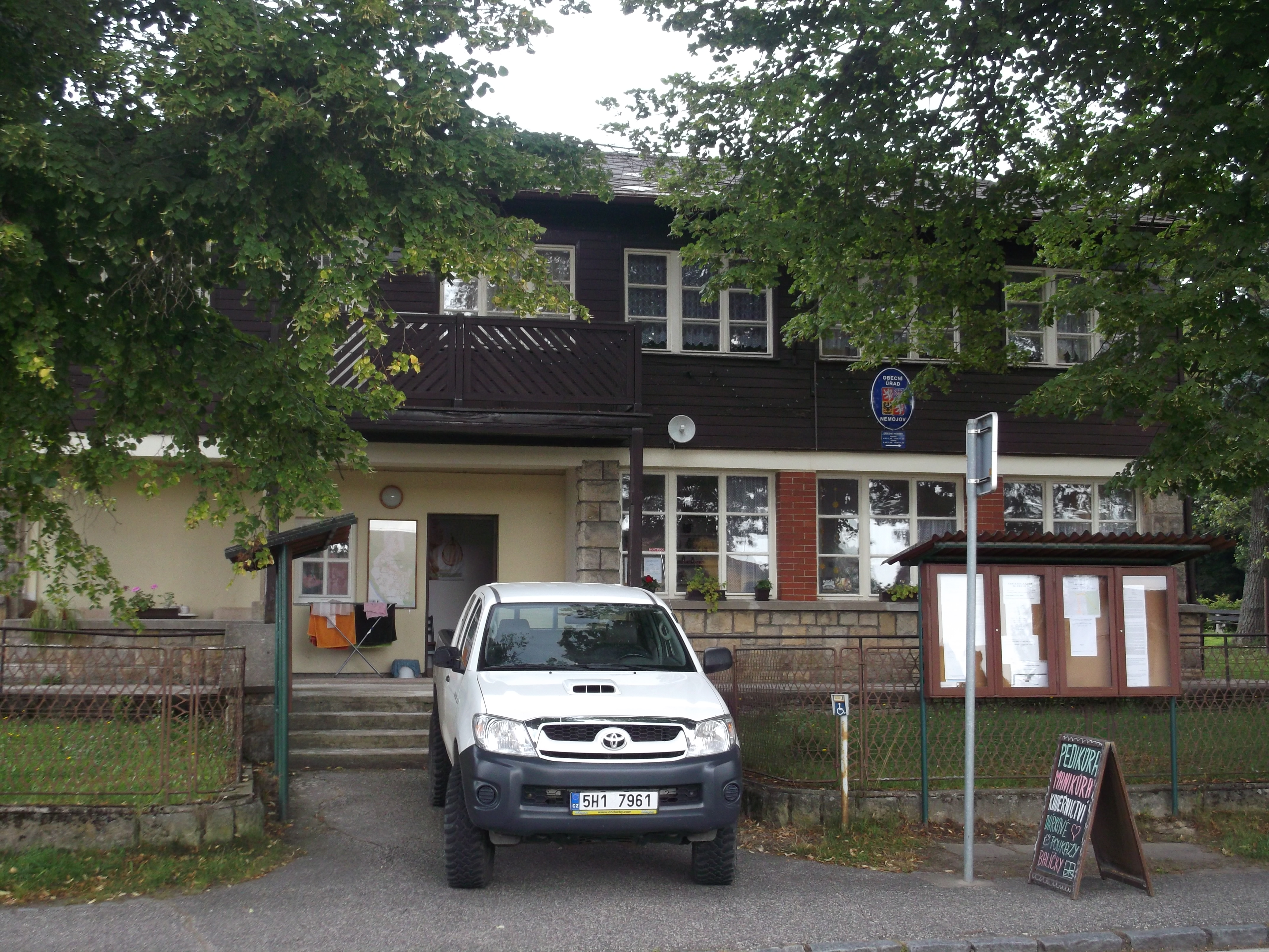 Dolní Nemojov - obecní úřad Nemojov